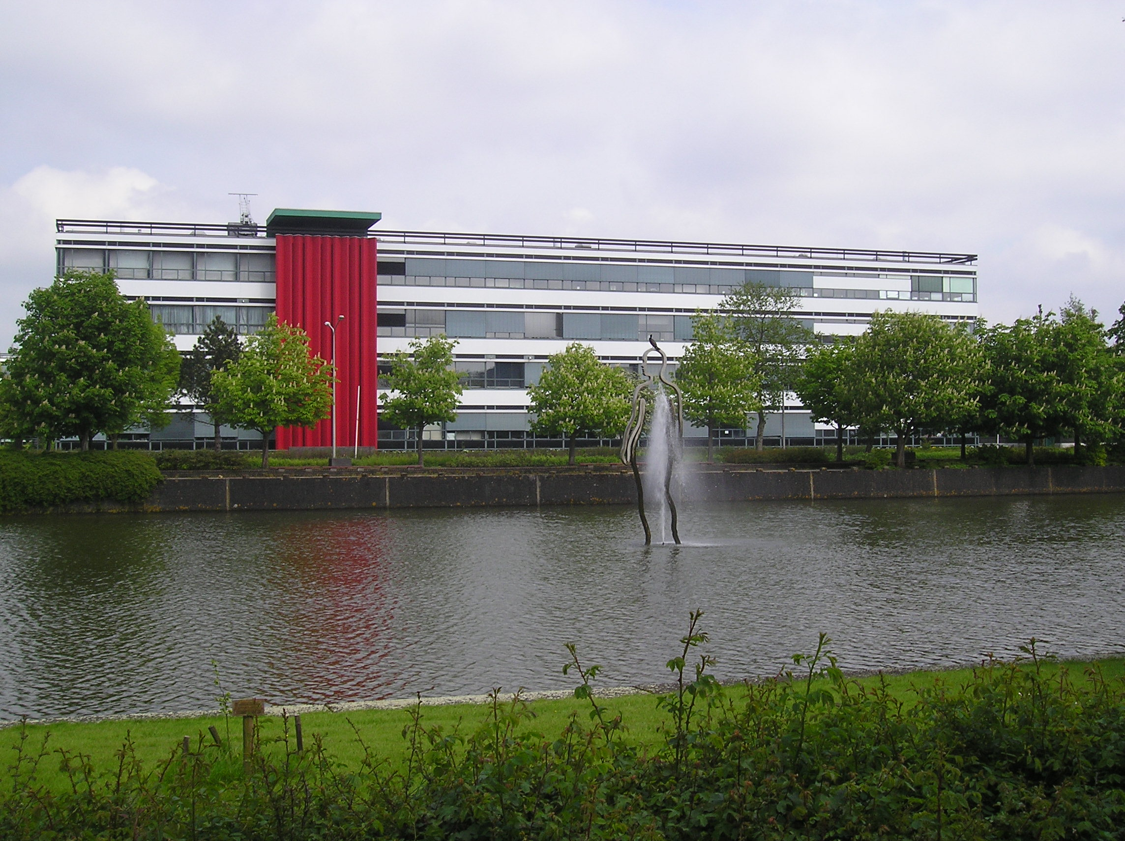 Gebouw van de Faculteit Wiskunde en Natuurwetenschappen, voor de studies natuurkunde en scheikunde. Groningen